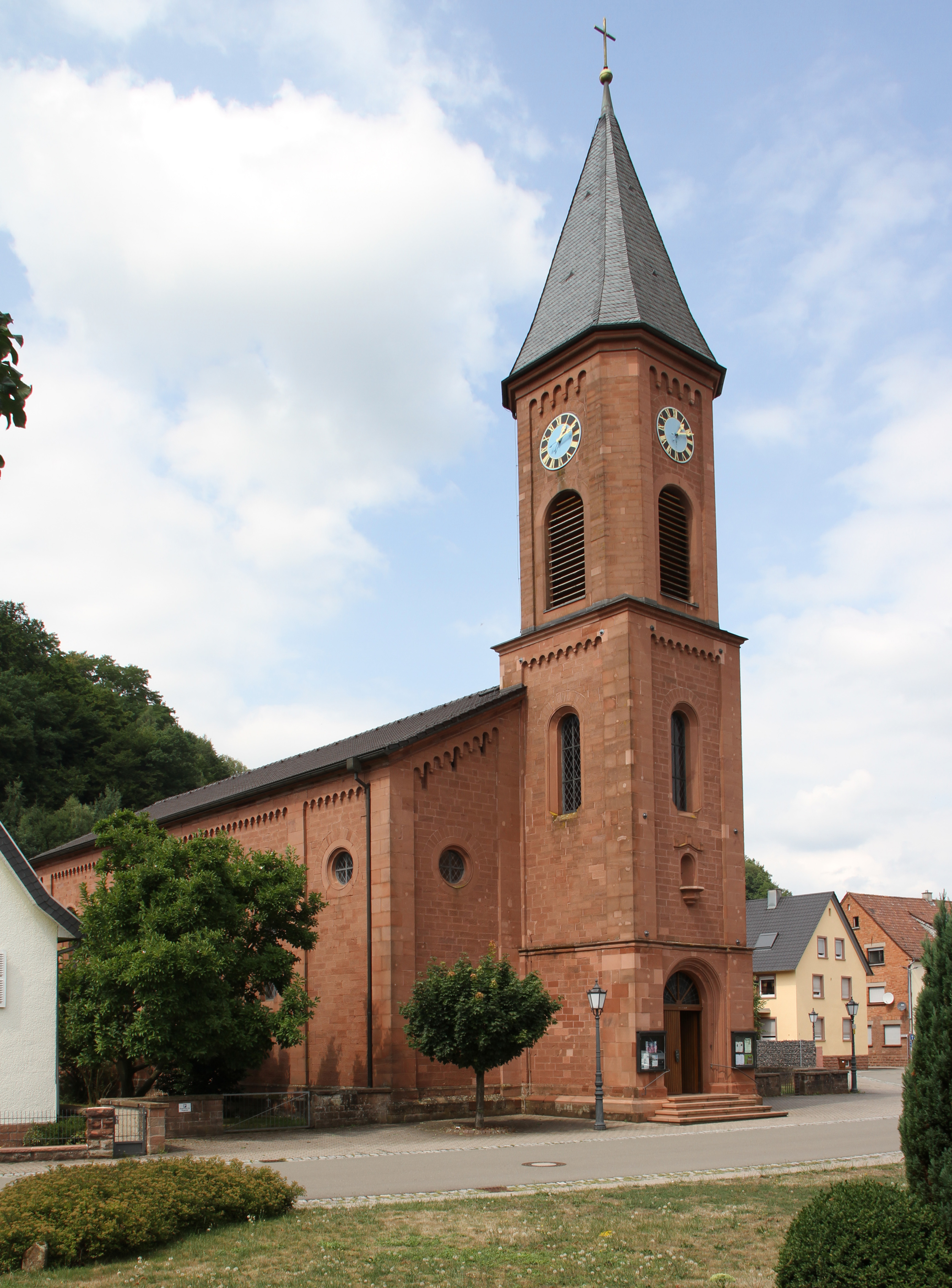 Bruchweiler-Bärenbach, Gartenstraße 1; katholische Pfarrkirche Heilig Kreuz; neuromanischer Saalbau, 1840.